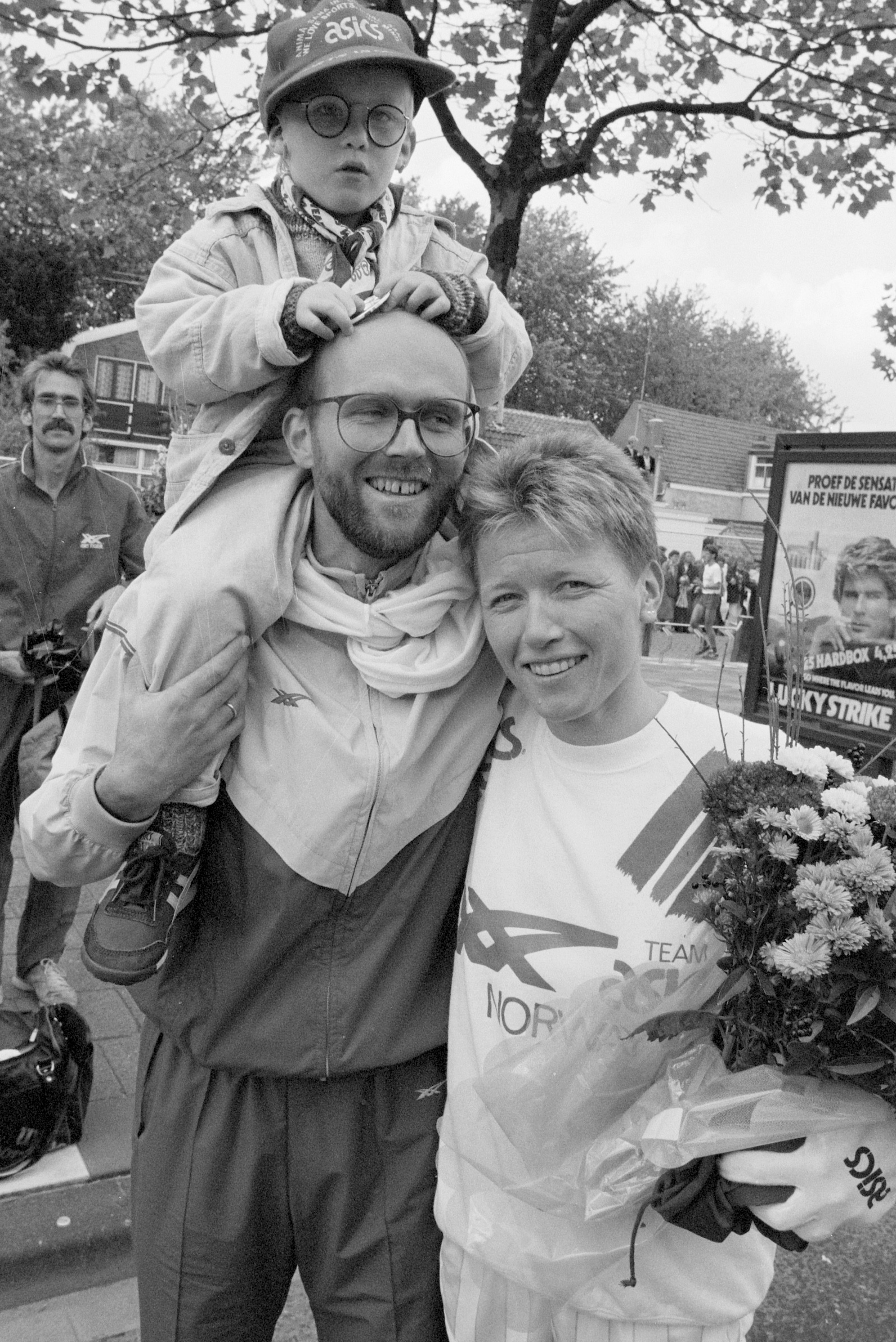 Dam tot dam-loop (16 km) finish in Zaandam; Ingrid Kristiansen met echtgenoot en kind